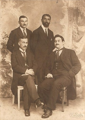 İstanbul Konfransına göndərilmiş (1918) Azərbaycan Heyəti-Mürəxxəsəsinin üzvləri: sədr Məhəmmədəmin Rəsulzadə (öndə sağdakı) və üzvlər Xəlil bəy Xasməhəmmədov (öndə soldakı), Əhməd bəy Pepinov (ayaqüstə soldakı), Aslan bəy Səfikürdski (ayaqüstə sağdakı). İstanbul, 1918.